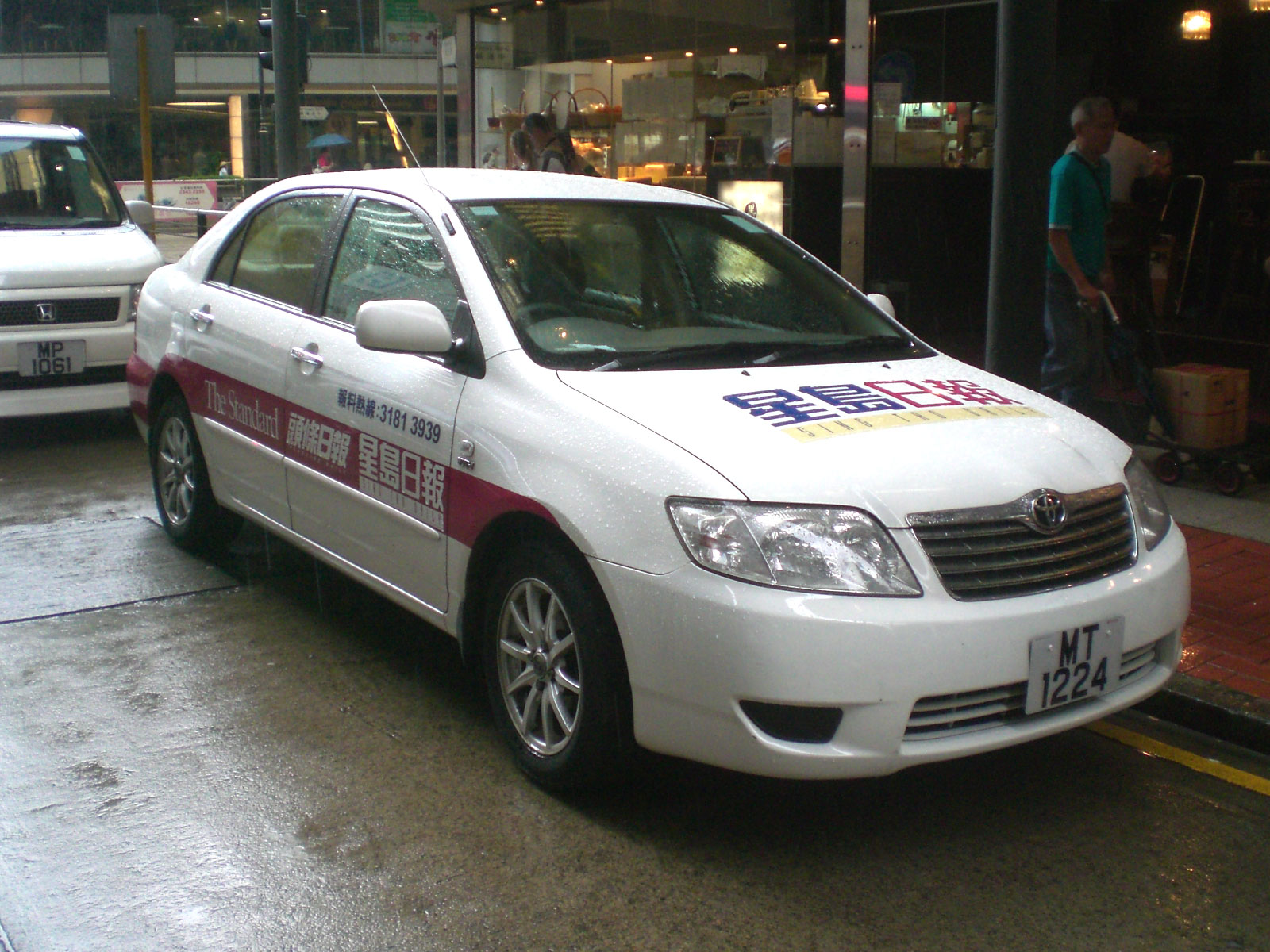 香港zh:上環林士街星島日報採訪車